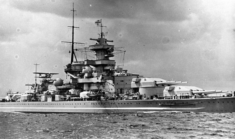 Schlachtschiff "Gneisenau" Schlachtschiff "Gneisenau"